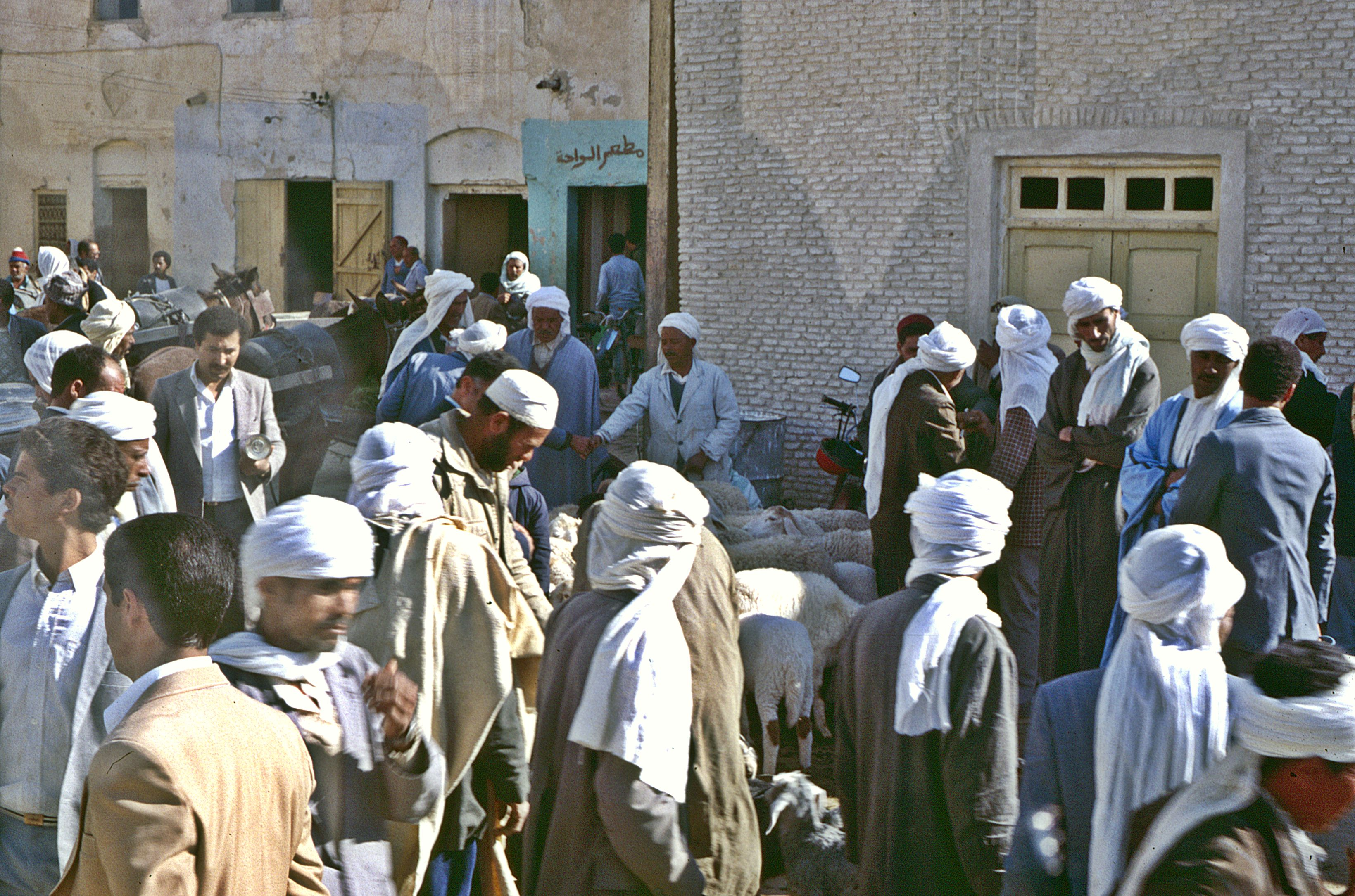 Algeriermarkt in Tozeur